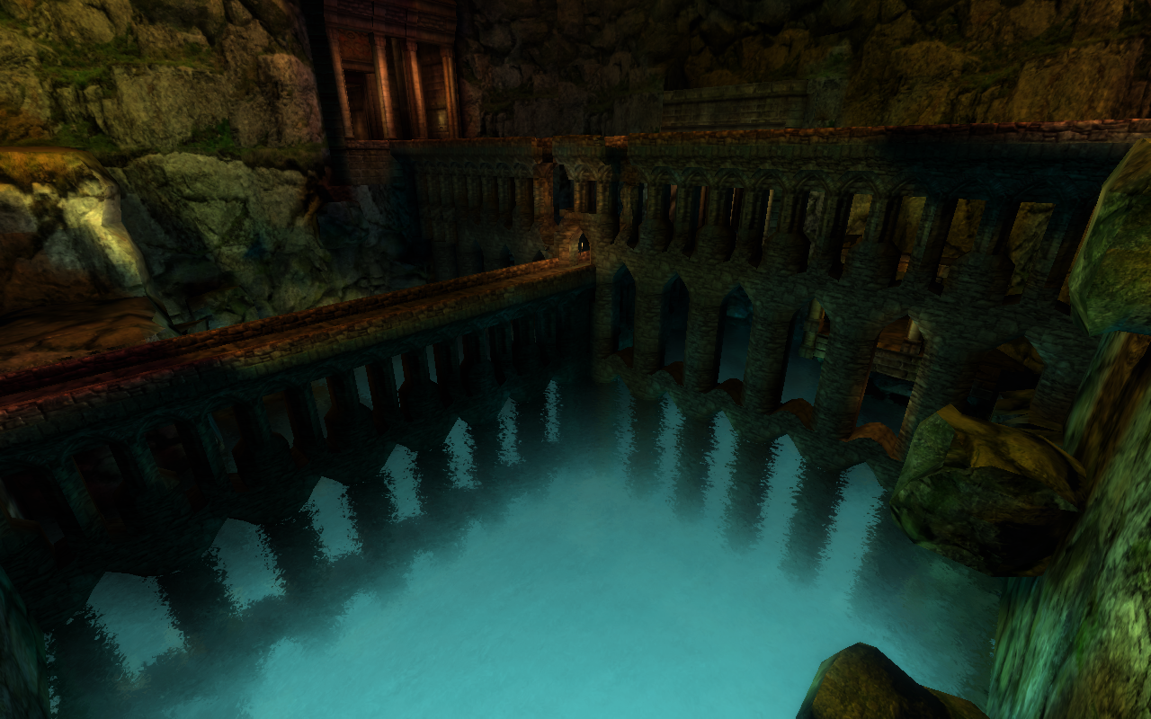 Screenshot zur Demonstration der Shadertechnologien von Cube2